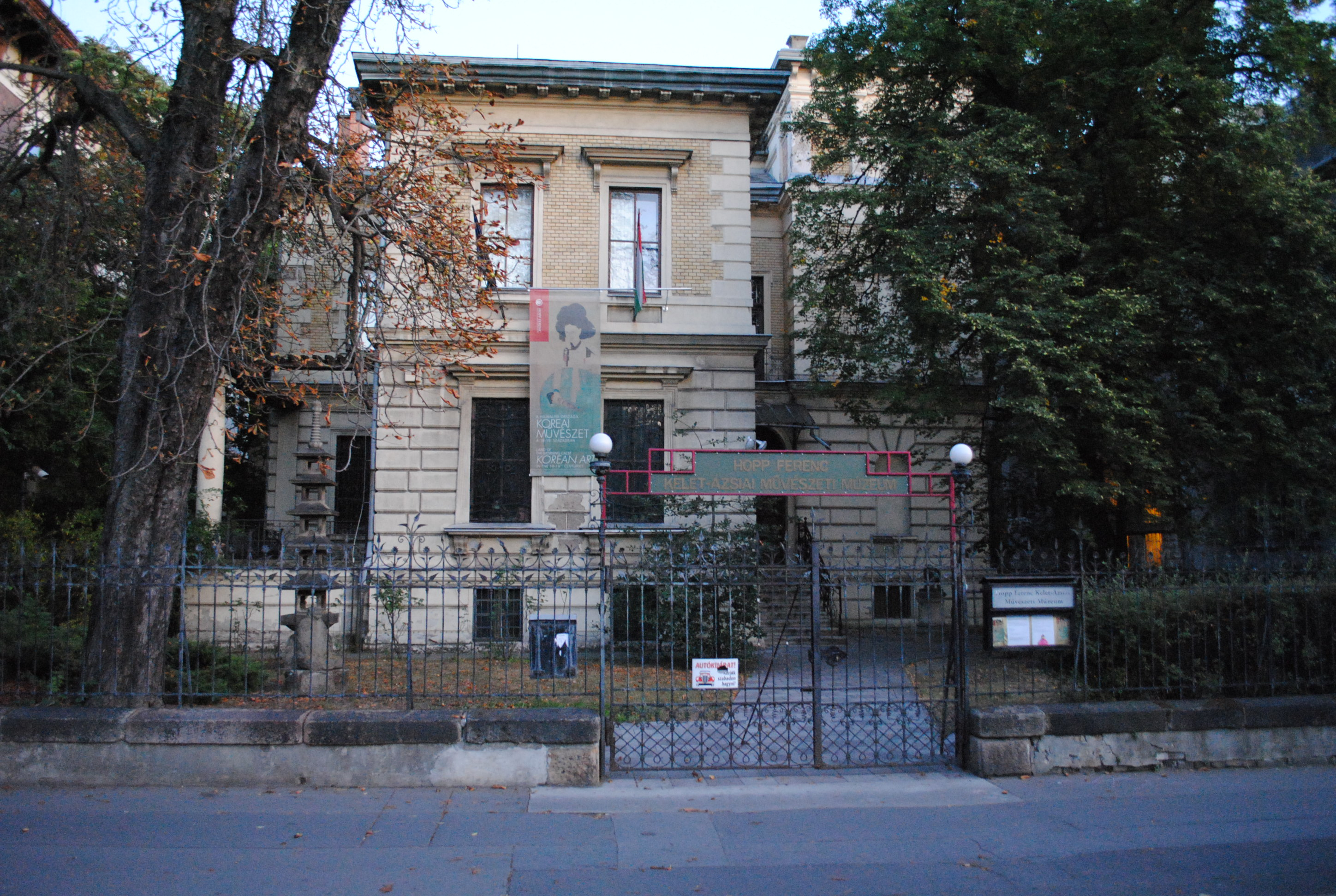 Knorr-villa (majd Hopp-villa) (Budapest 6, Andrássy út 103.) This is a photo of a monument in Hungary, Identifier: 12547